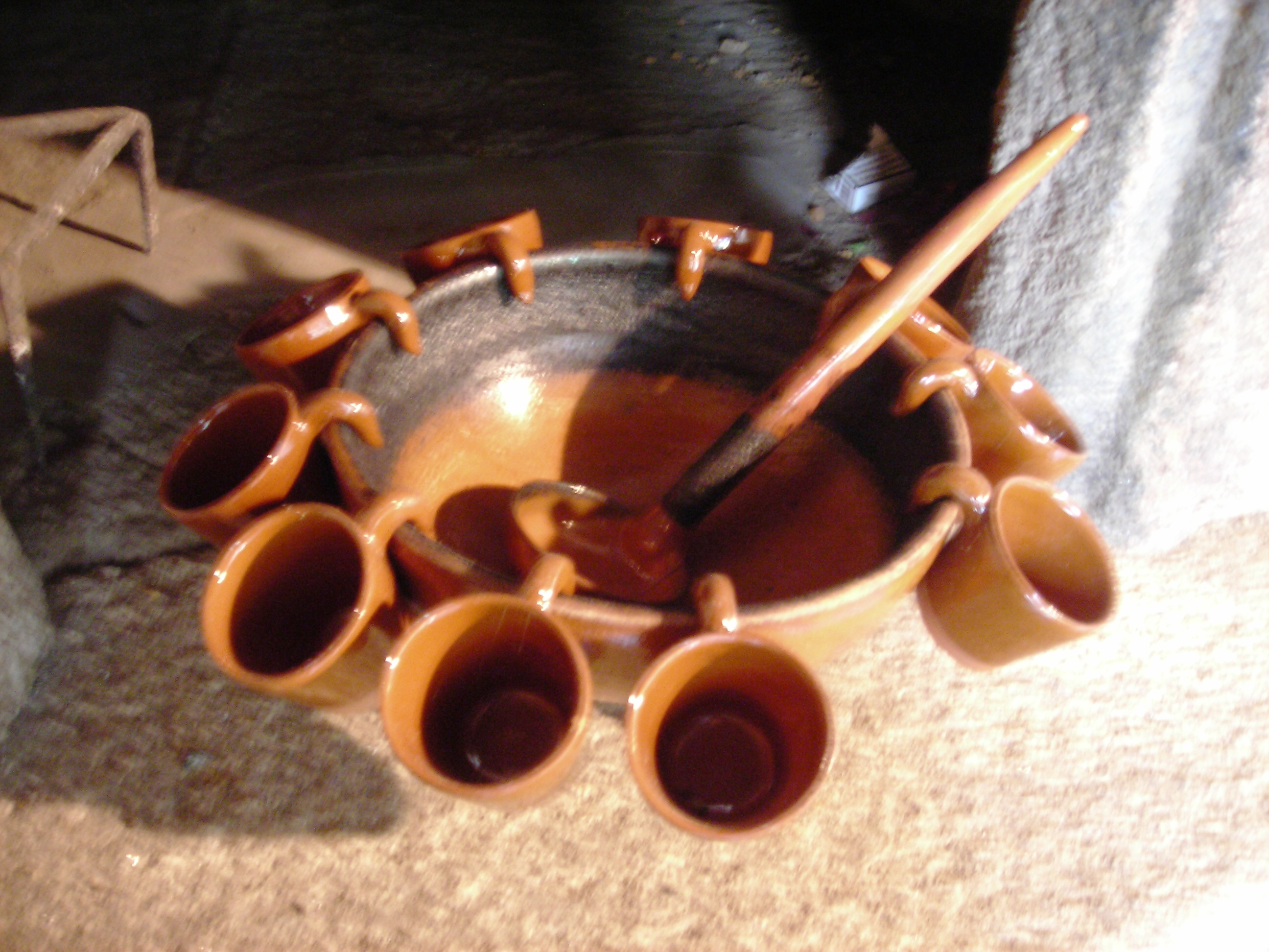 The tools for a queimada - just add the orujo and a match! Os aparelhos para a queimada. Somente falta aguardente e isqueiro.